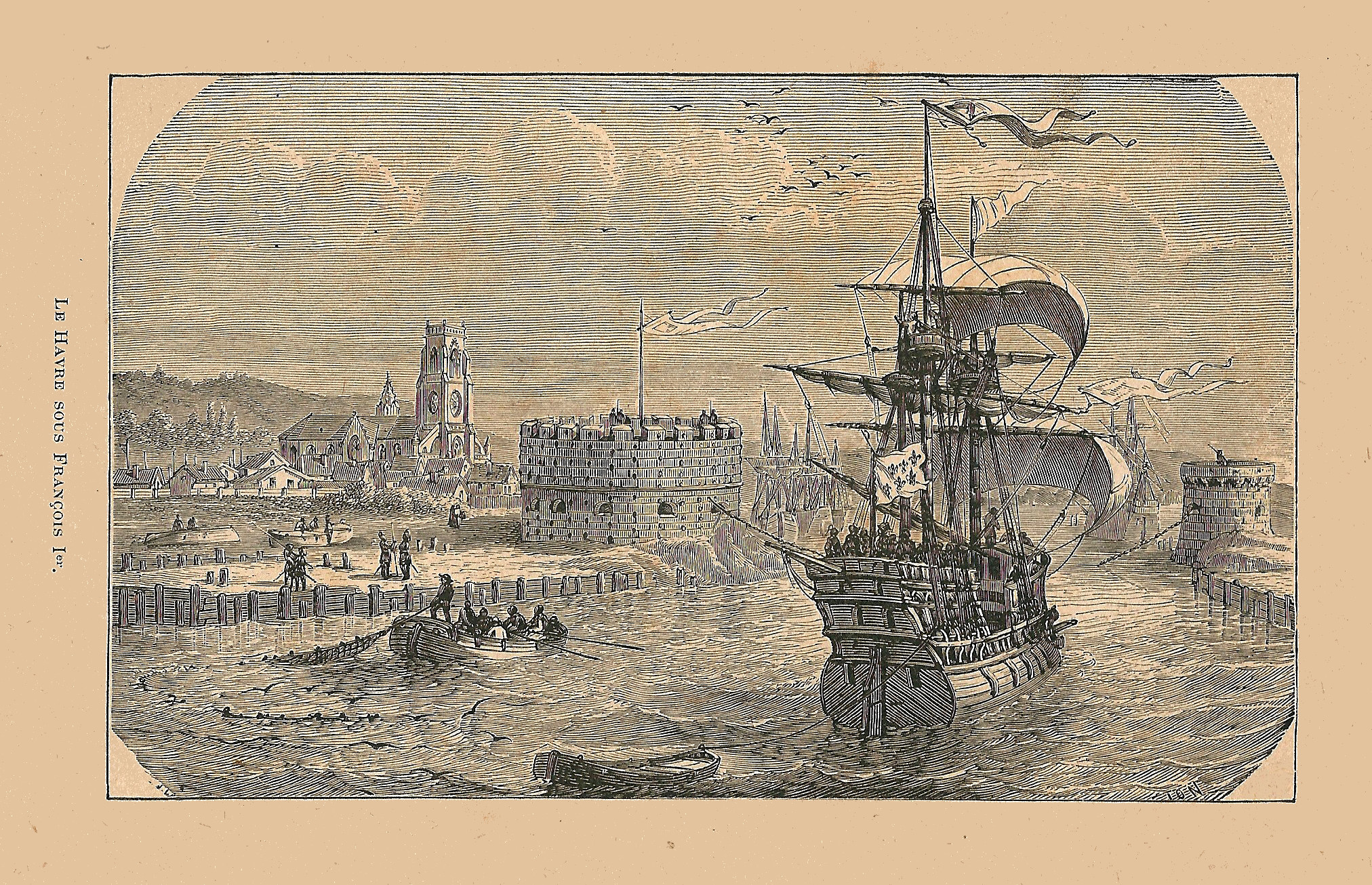 Le Havre sous François 1er